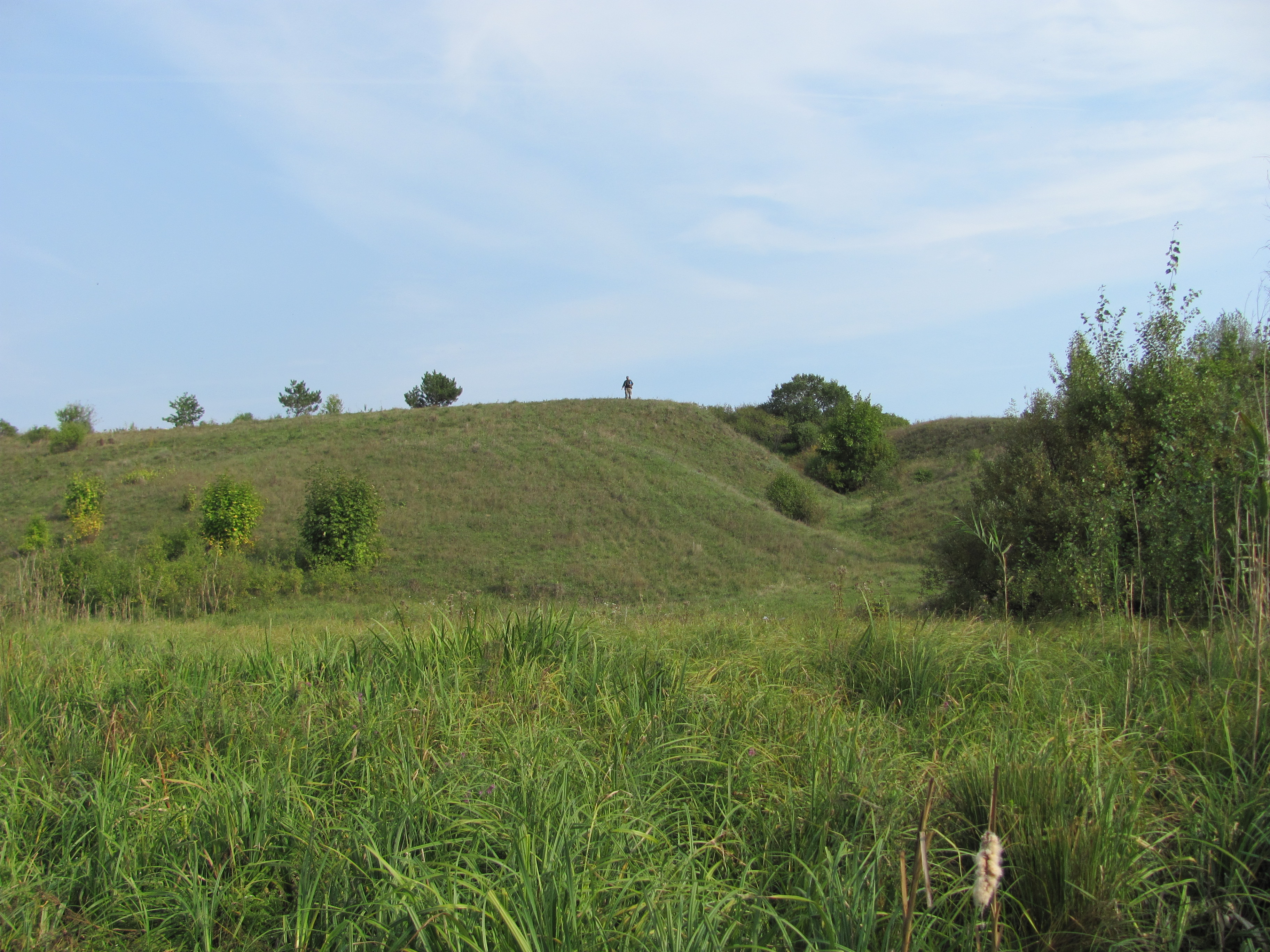 Городище біля с. Велика Гомільша